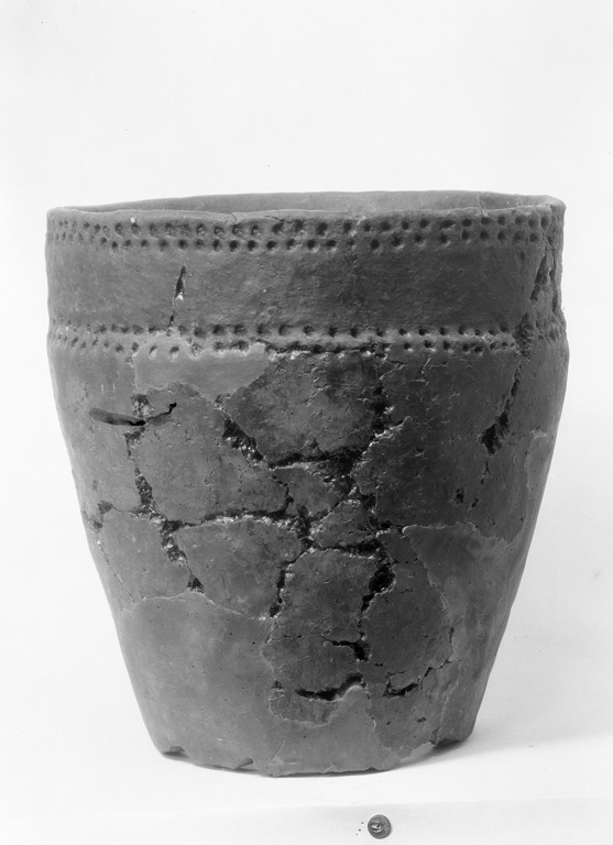 Rekonstruerat lerkärl. Motiv: Alvastra pålbyggnad Nyckelord: Riksintressen Kategori: Arkeologiskt material, Boplats Rekonstruerat lerkärl.